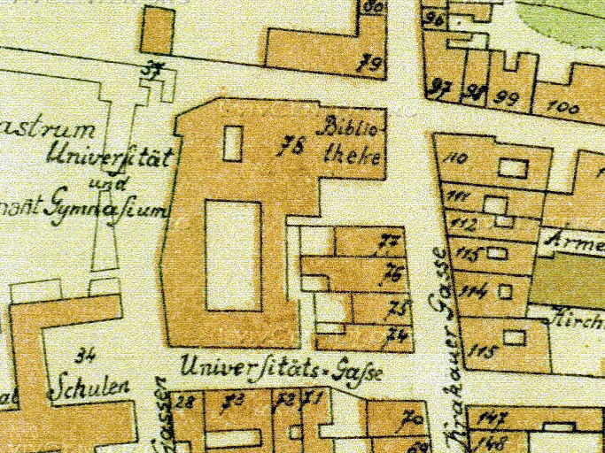 тринітарський монастир на мапі Львова кінця 18 ст. Храм позначений на мапі як бібліотека.